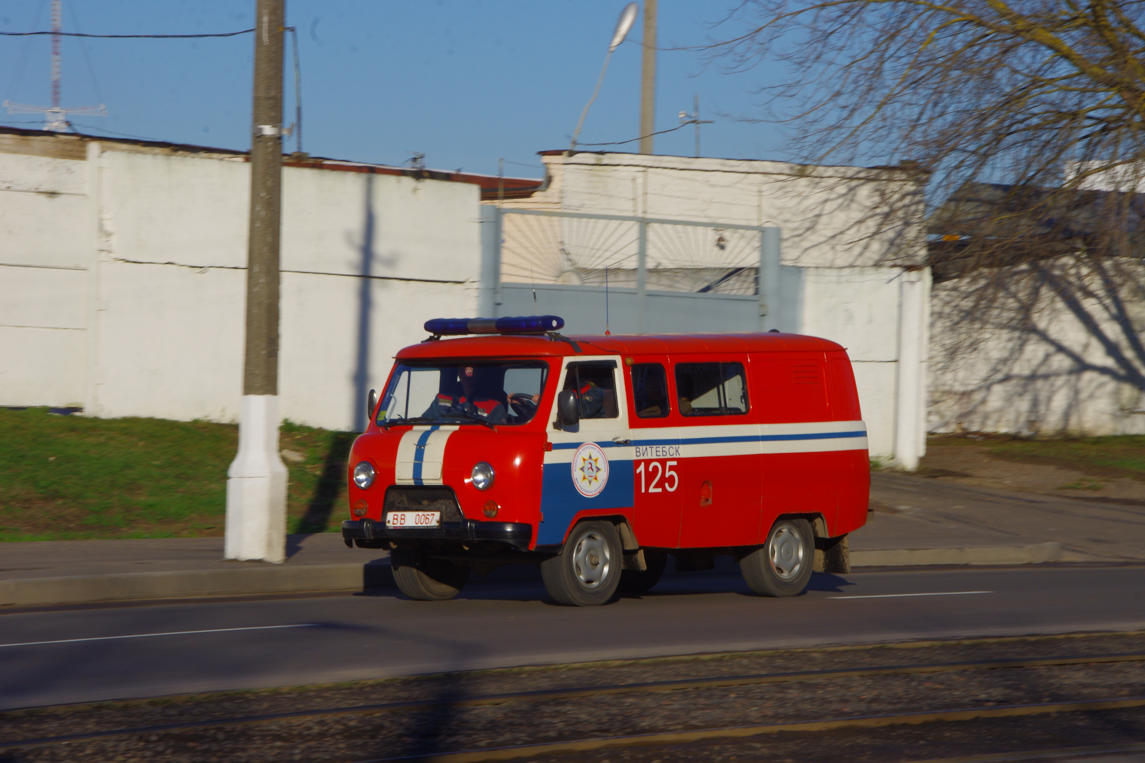 Trucks in city of Vitebsk. --- Снято в один из рабочих дней города Витебска